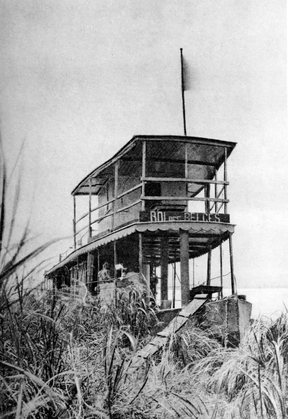 Le vapeur “Roi des Belges” dans le Haut-Congo (1889) p. 286